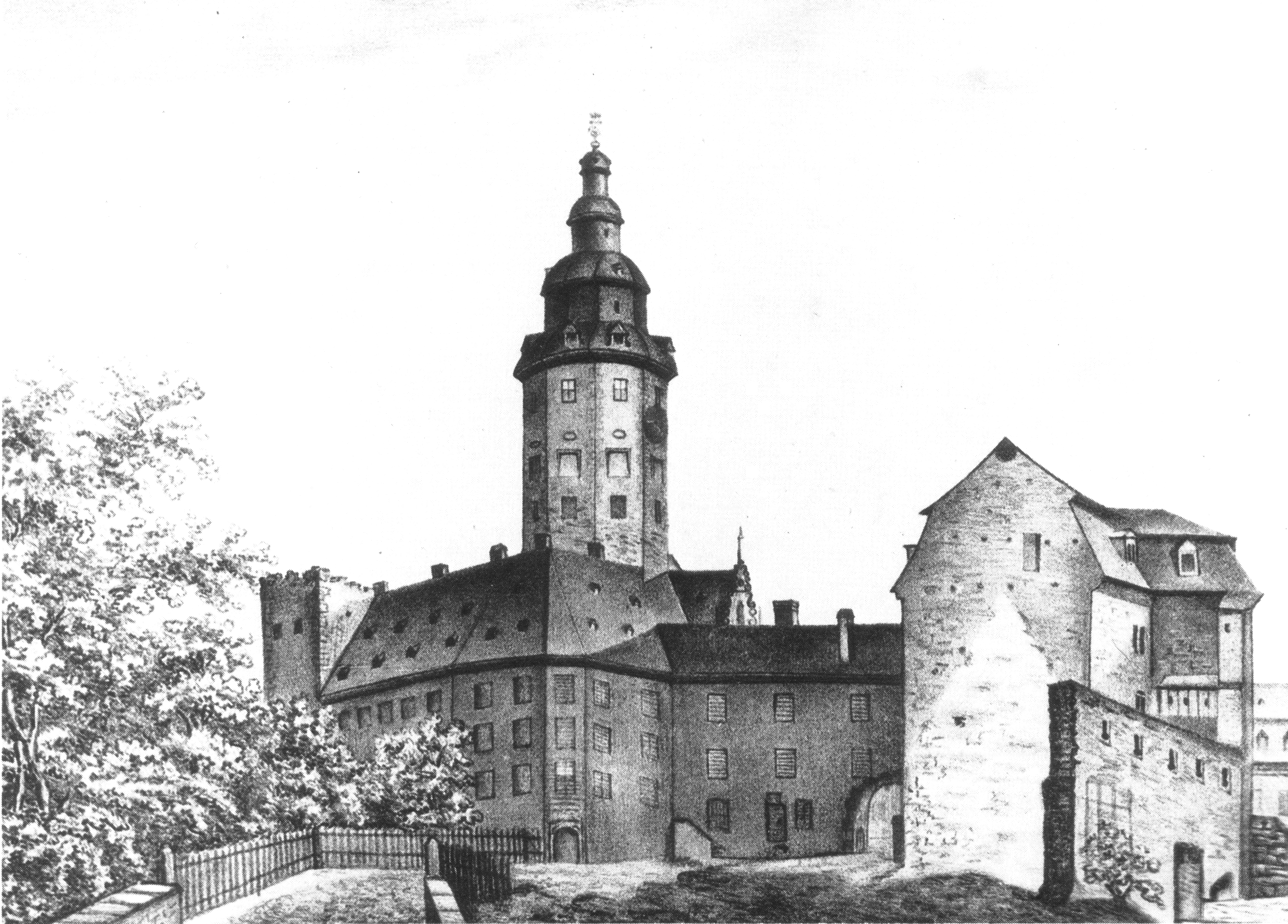 Lithographie "Das alte Schloß in Hanau während des Abbruchs".Stadtschloss Hanau während des Abbruchs 1829. Der Bergfried ist hier fälschlich mit achteckigem Grundriss wiedergegeben. Vo, sog. Archivturm fehlt bereits das Dach